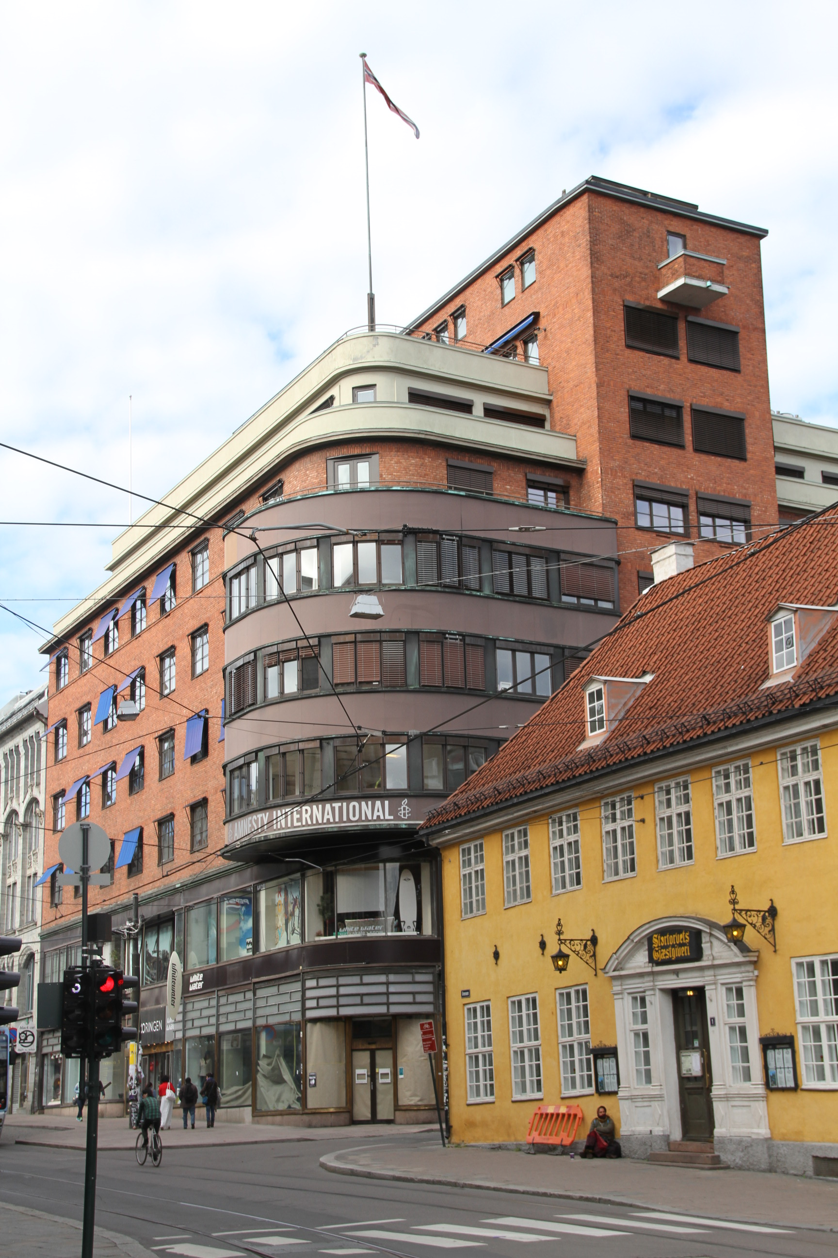 Oslo og Akers Sparebanks funksjonelle signalbygg i Grensen, Oslo.